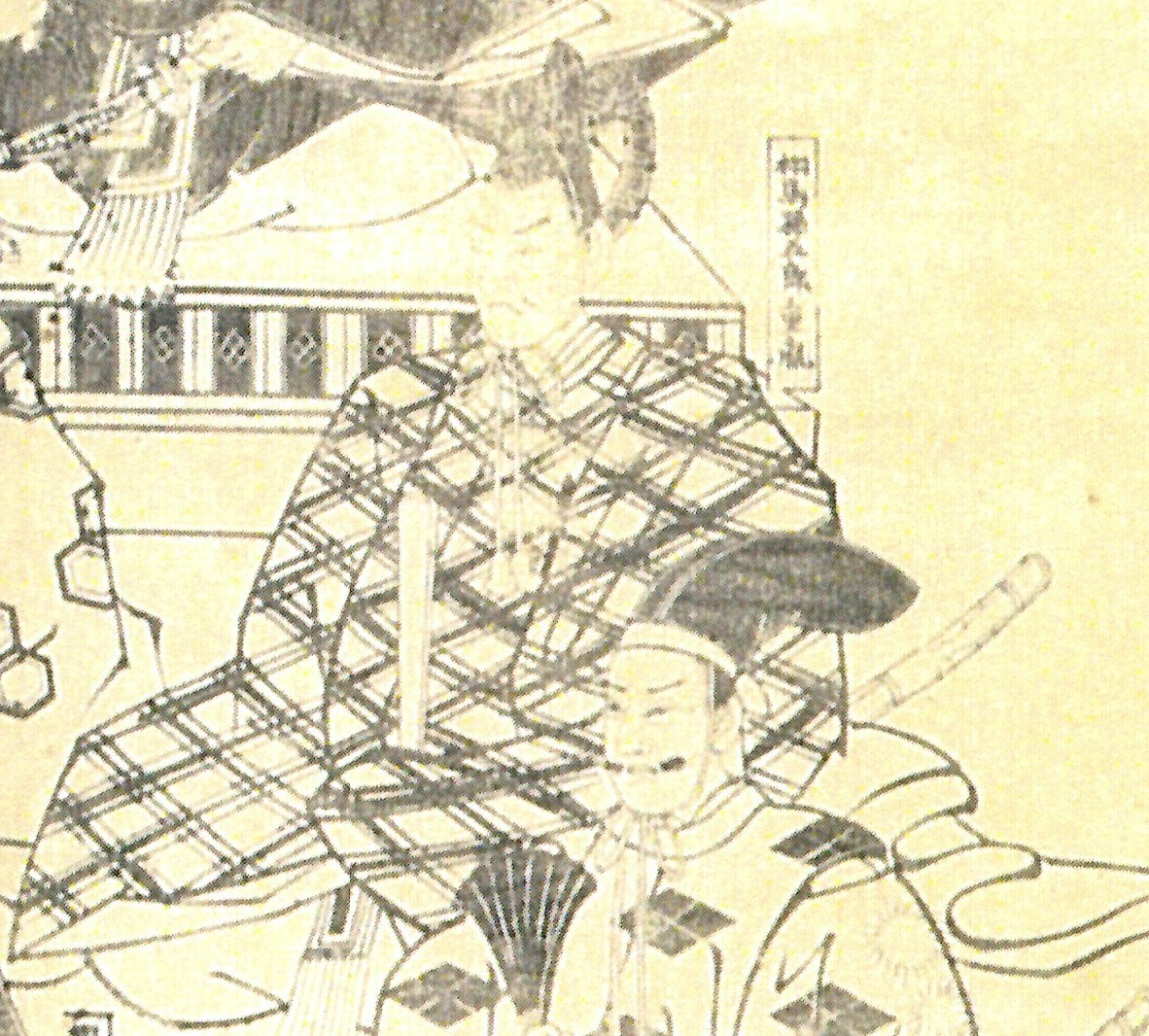 相馬家6代当主相馬重胤の画像(「相馬家歴代藩主像」より)。